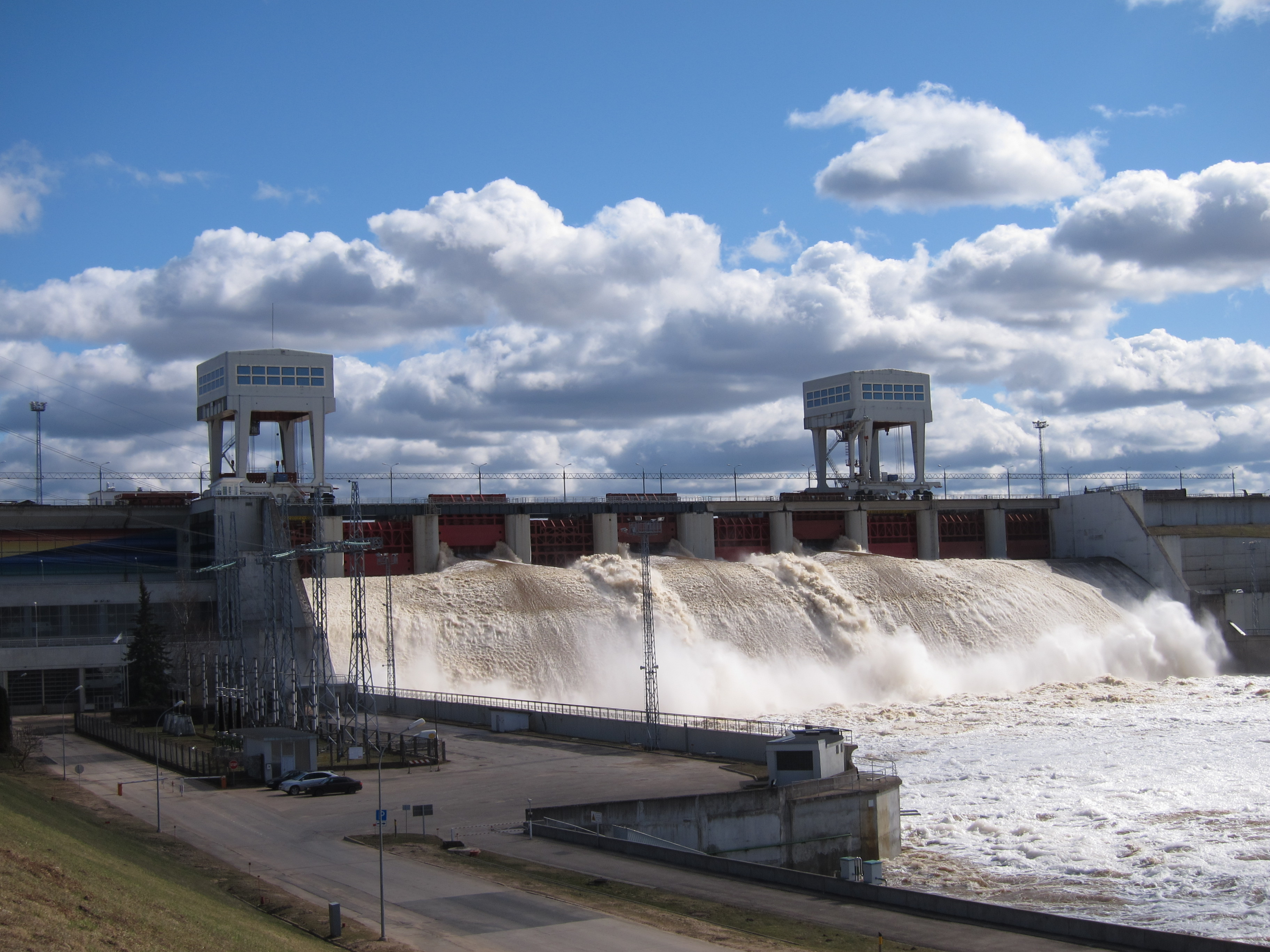 Pļaviņu HES ar atvērtām slūžām.